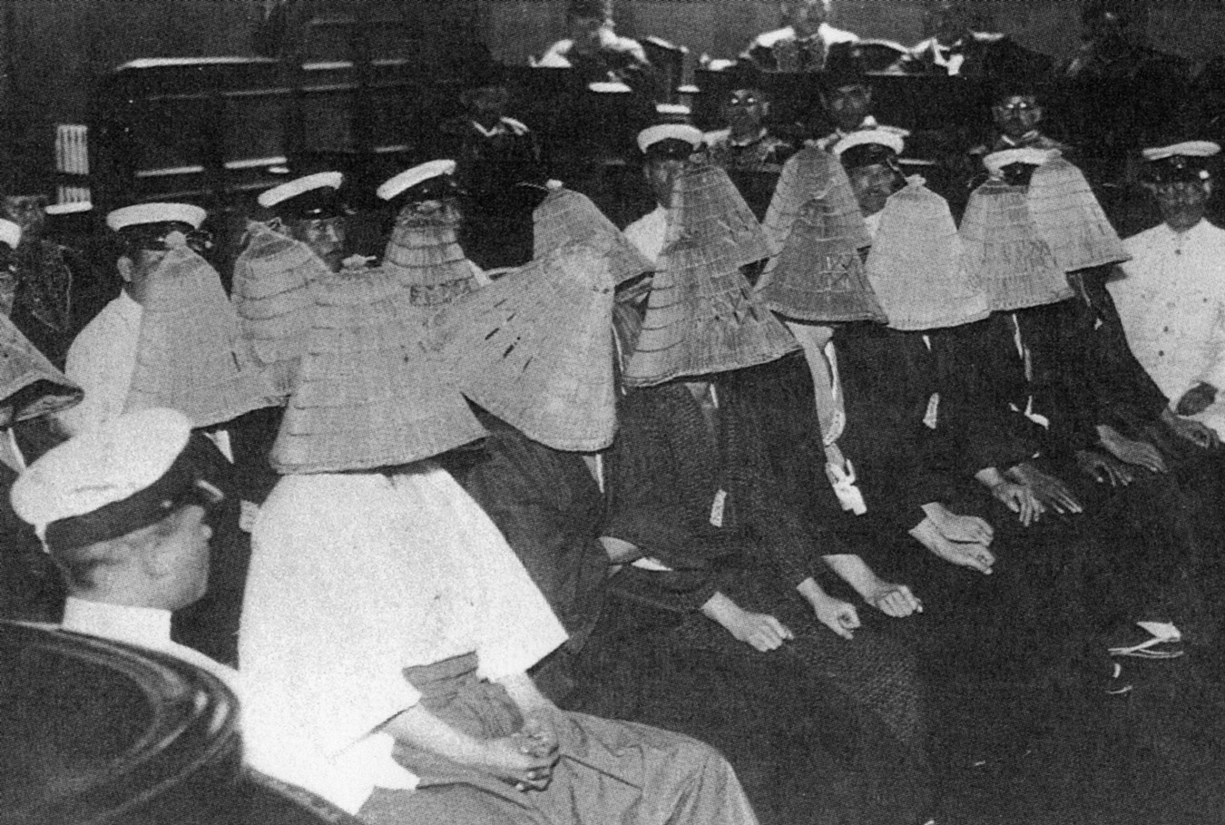 法廷内の血盟団事件の被告。